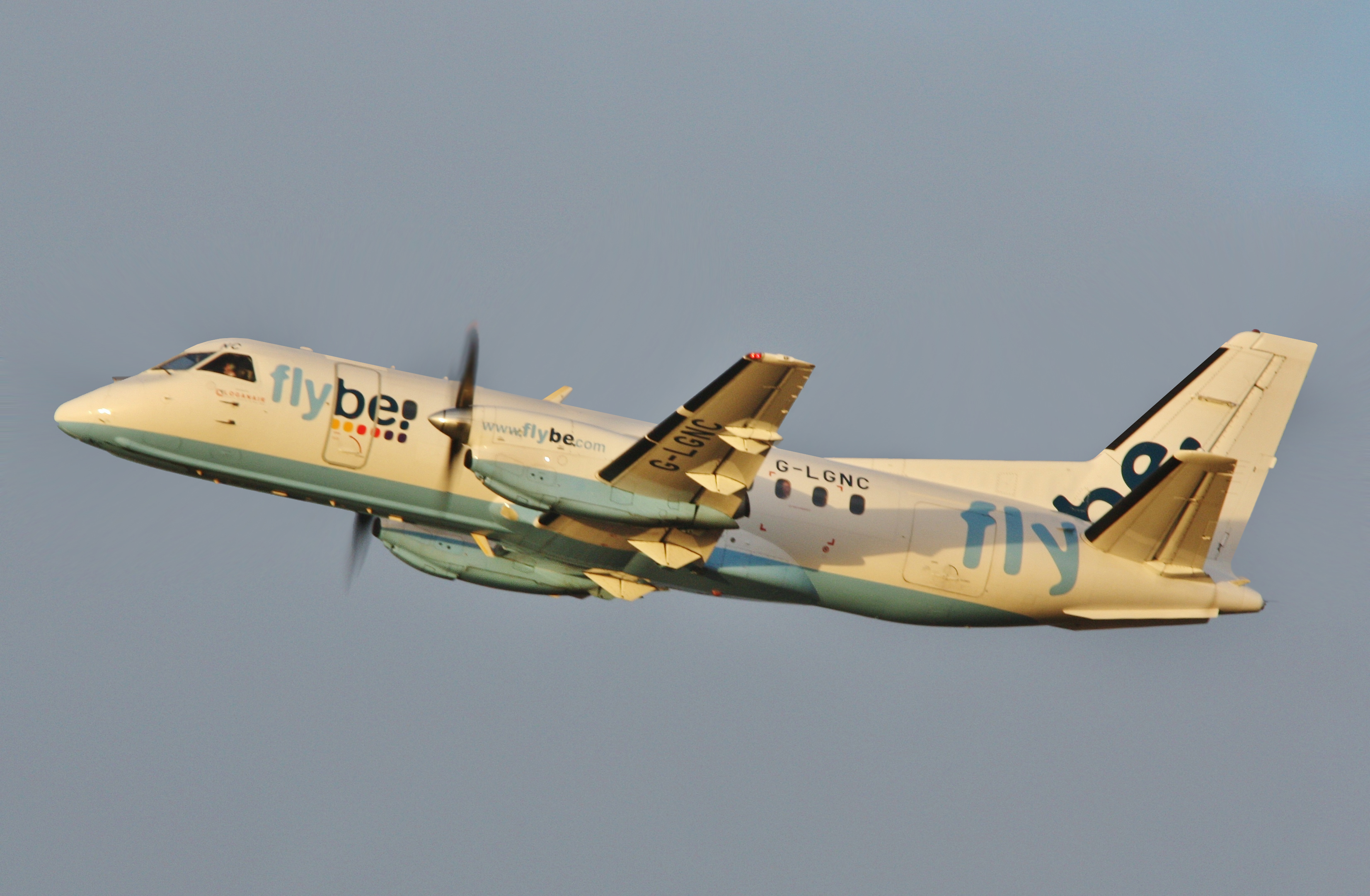 Departing Sumburgh